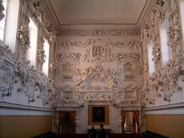 Interno dell'Oratorio del Rosario di Santa Cita a Palermo, impreziosito dalle decorazioni in stucco (1686 - 1718) di Giacomo Serpotta.